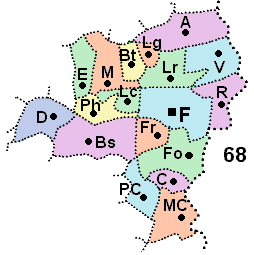 carte du canton de Fontaine (Territoire de Belfort)